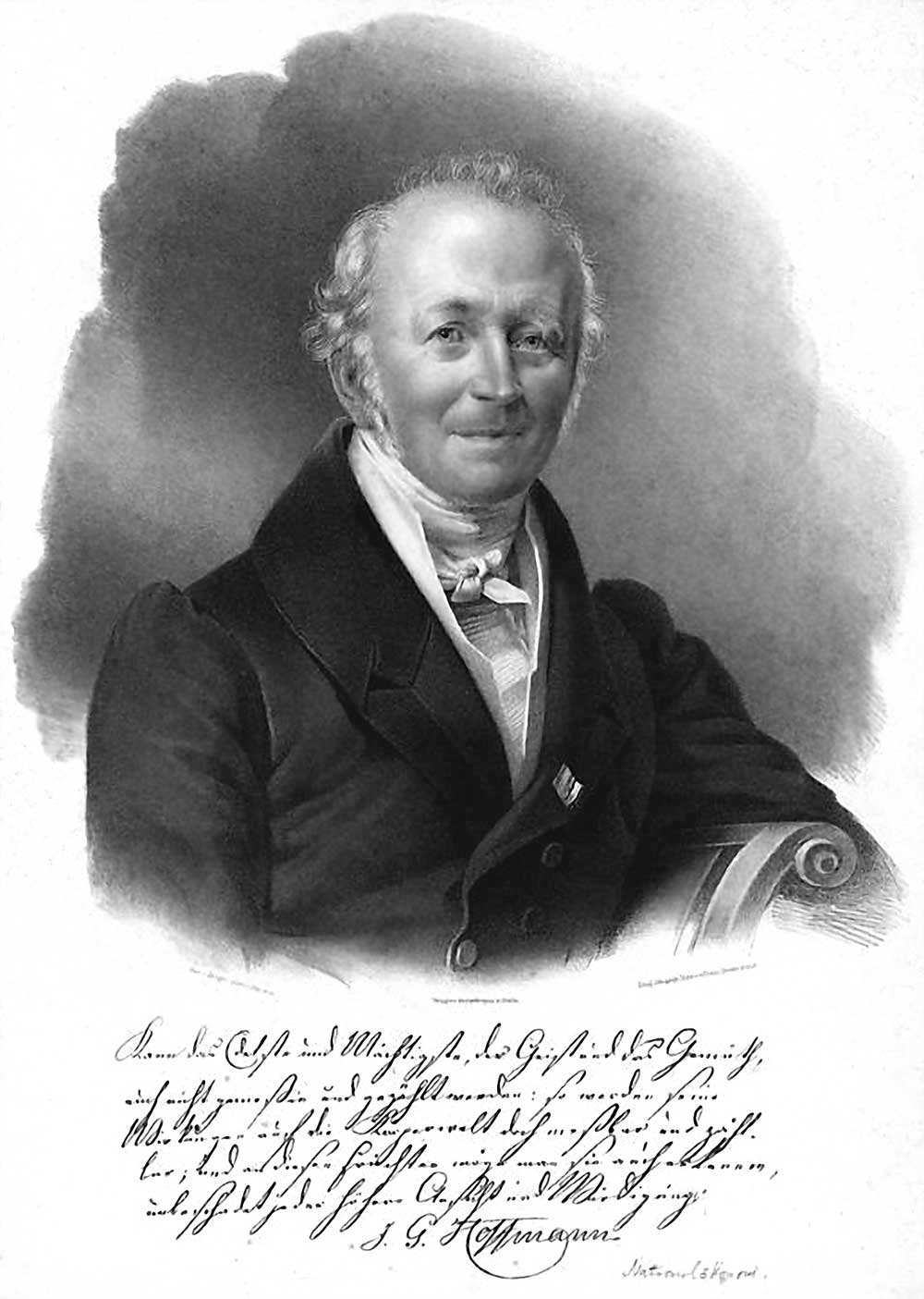 Johann Gottfried Hoffmann (1765–1847), staatswirtschaftlicher Schriftsteller